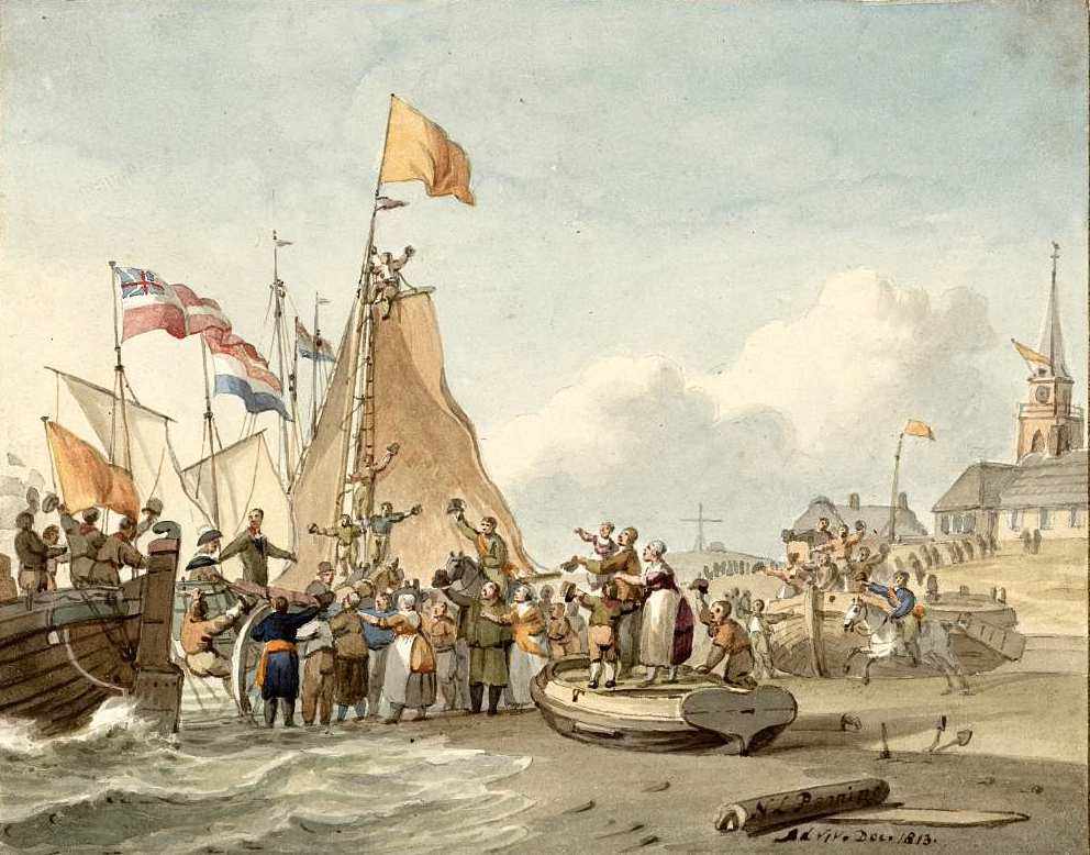 Schilderij met een afbeelding van de landing van prins Willem Frederik van Oranje door Nicolaas Lodewijk Penning, naar Reinier Vinkeles en een tekening van Jan Willem Pieneman